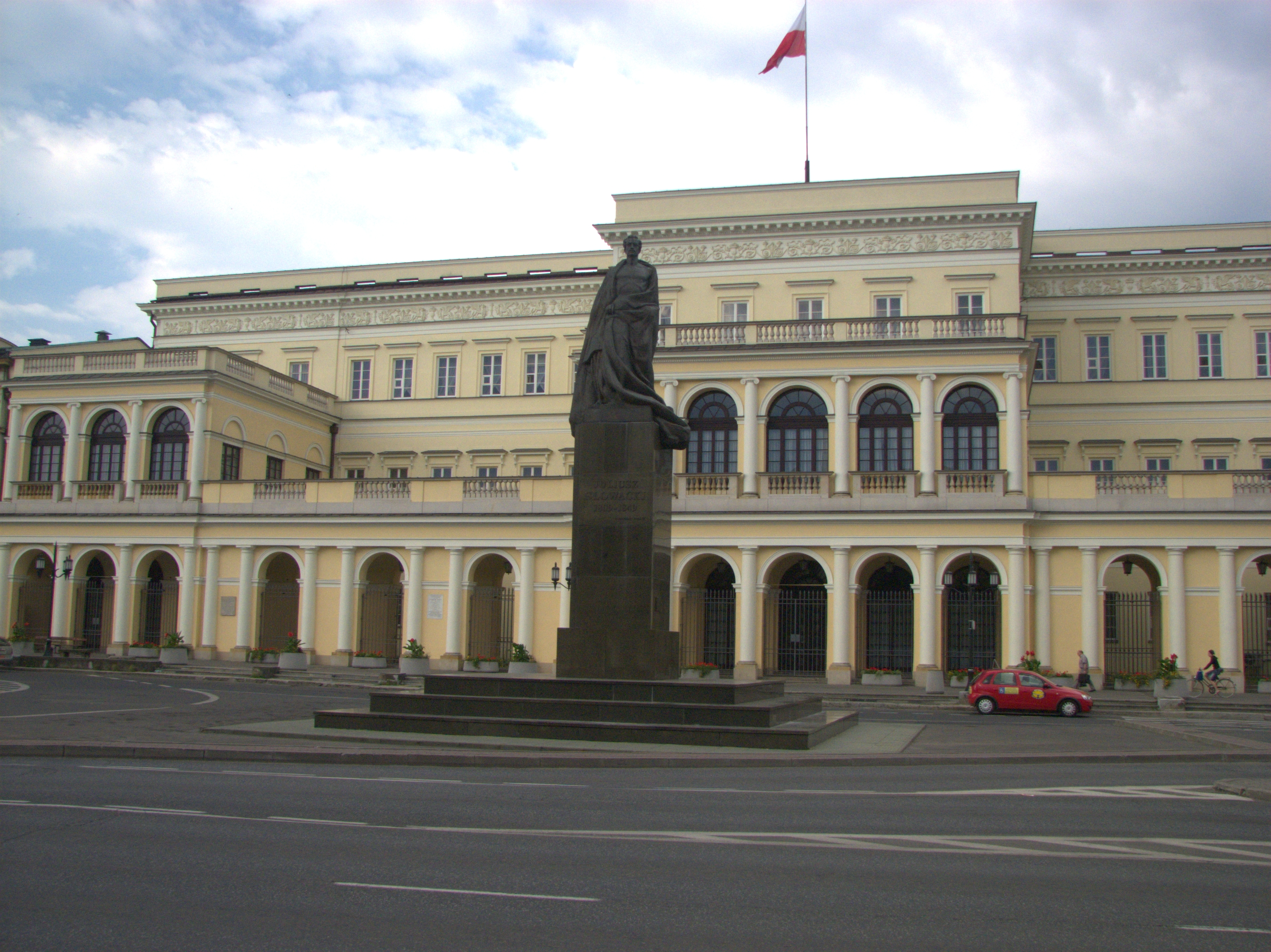 Pomnik Juliusza Słowackiego w Warszawie